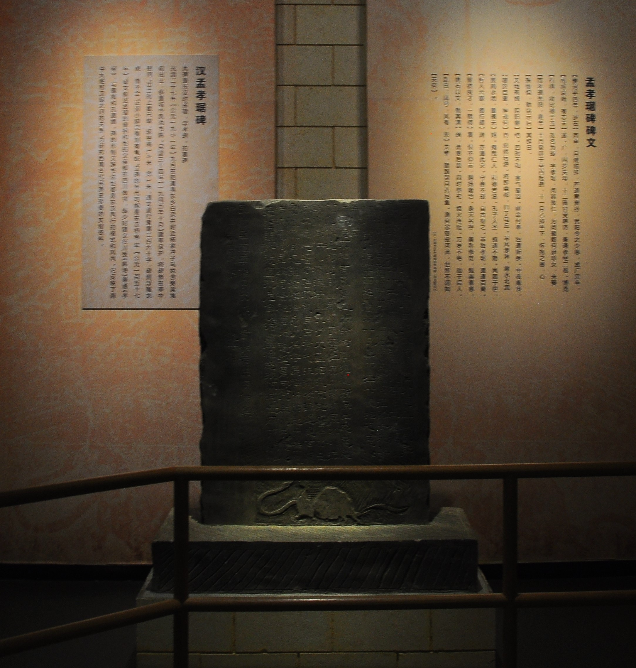 中文（中国大陆）: 云南省博物馆-东汉-昭通-孟孝琚碑复制品